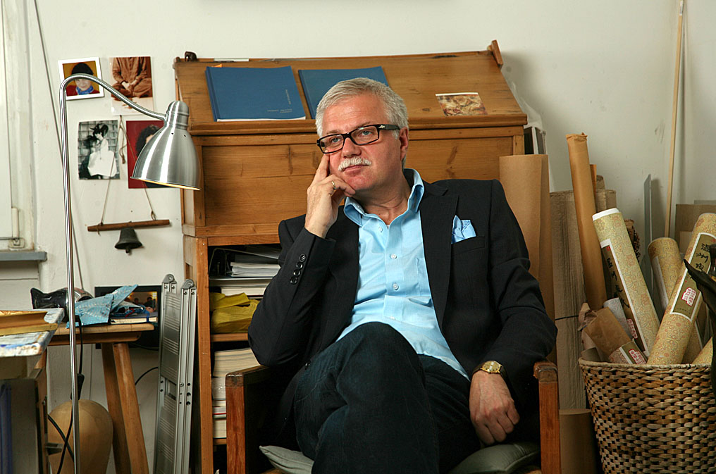 Horst Rettig in seinem Atelier im Kunsthaus Worms